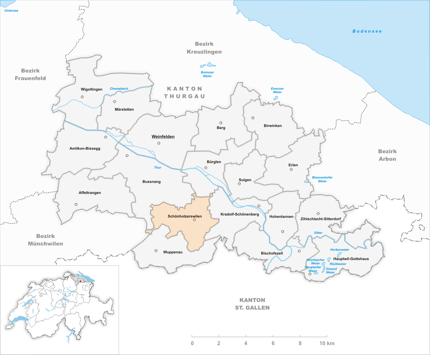 Municipality Schönholzerwilen